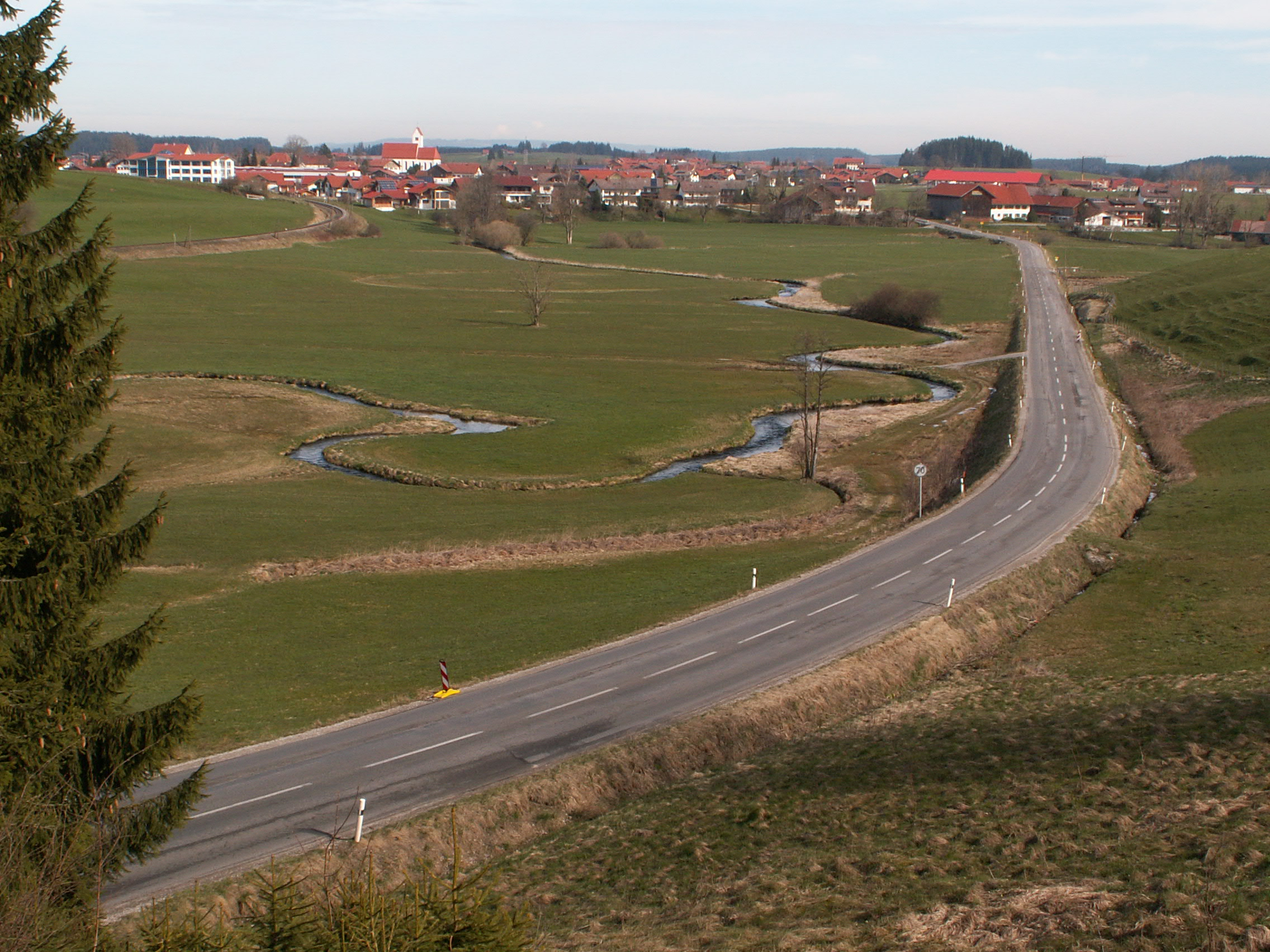 Mäander des Lengenwanger Mühlbachs